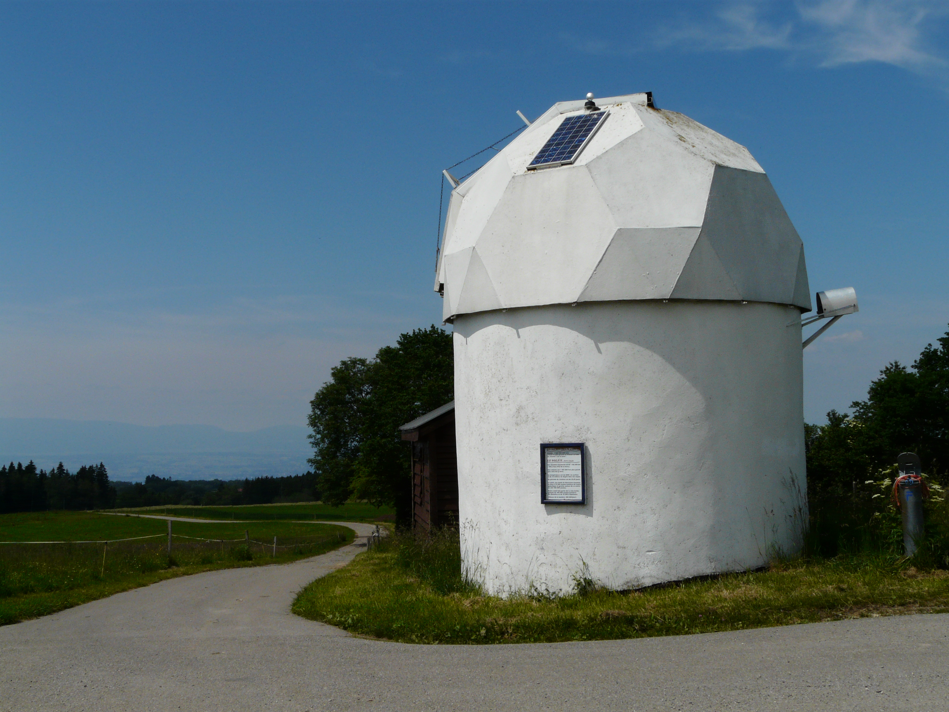 L'observatoire de Vinzier (Haute-Savoie)